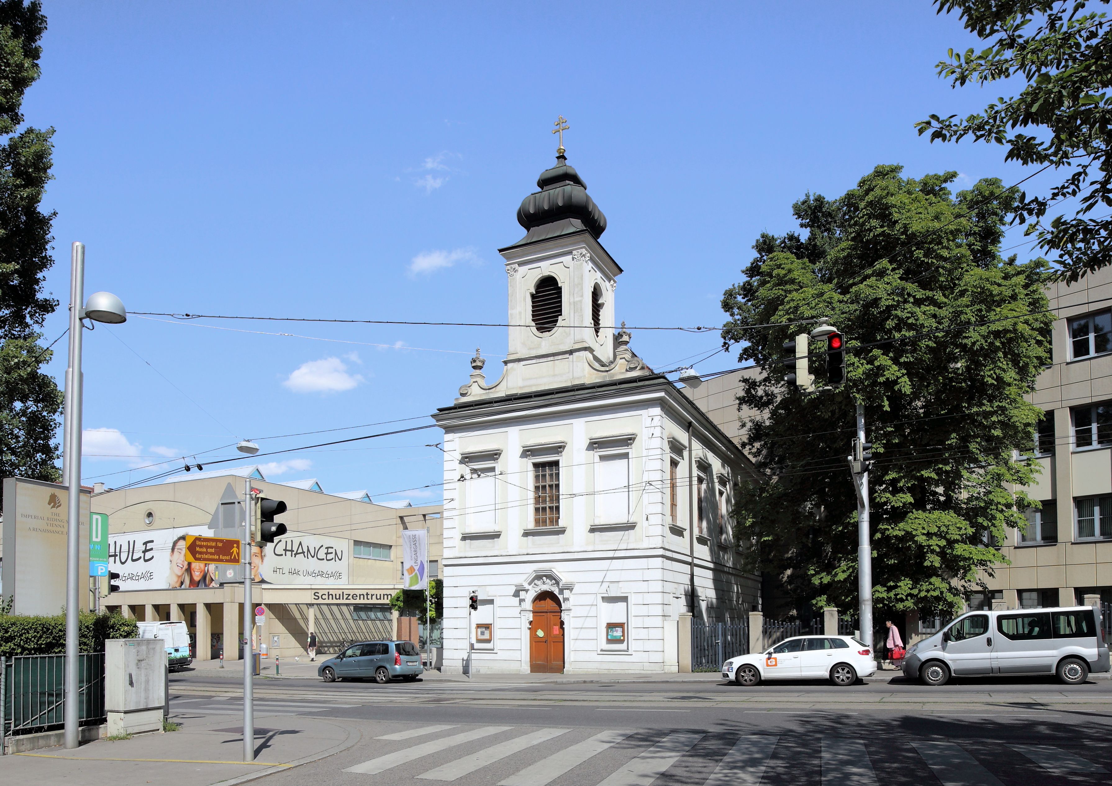 Die Januariuskapelle im 3. Wiener Gemeindebezirk Landstraße. Sie wurde 1734/35 von Johann Lucas von Hildebrandt im Zuge der Erweiterung des Palais Harrach für Aloys Thomas Raimund von Harrach erbaut. Im Zweiten Weltkrieg wurde sie schwer beschädigt und später wieder rekonstruiert; der Rest des Palais wurde 1968 abgerissen.